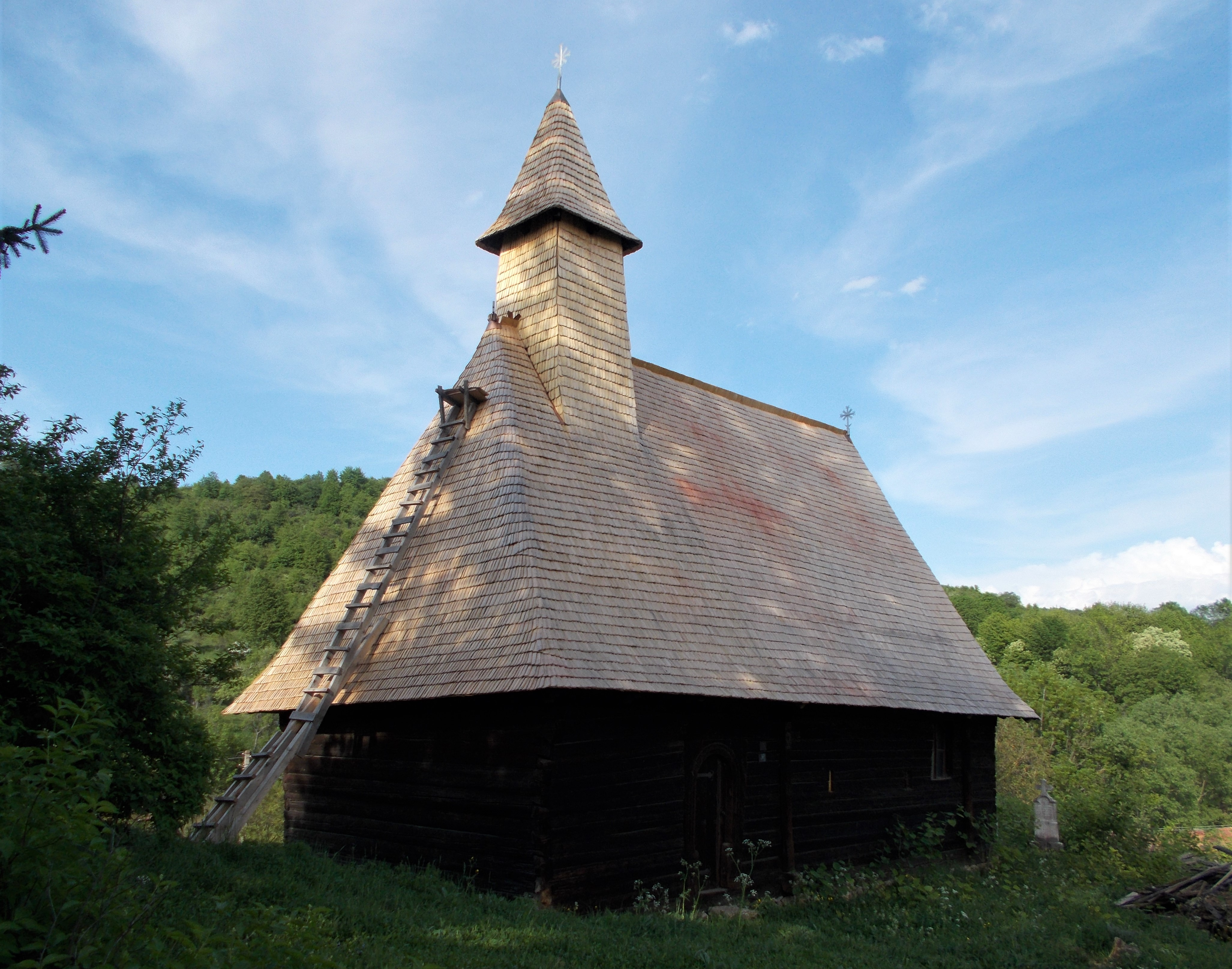 Biserica de lemn din satul Alun, județul Hunedoara